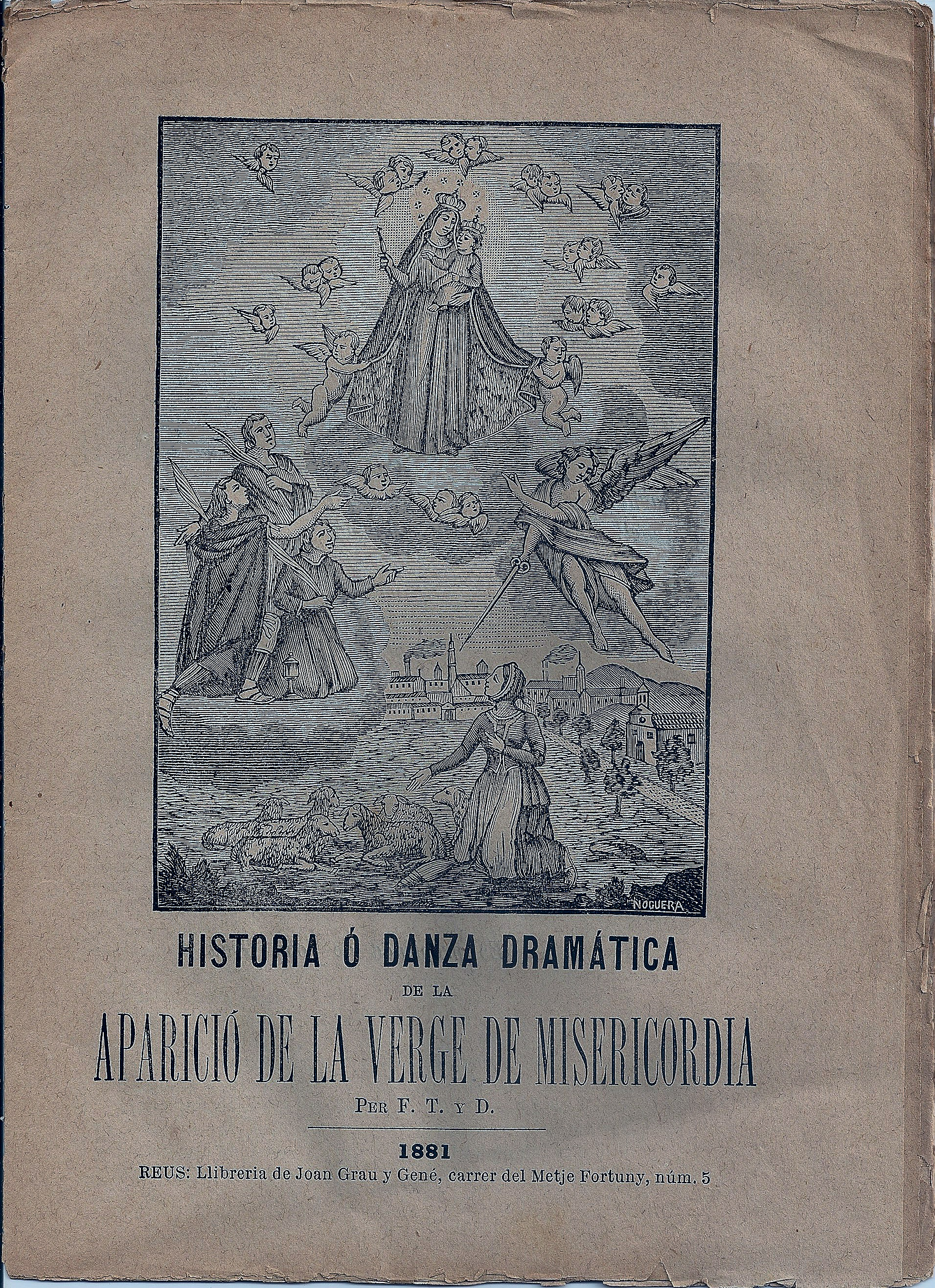 Portada d'una edició de 1881 del Ball de la Mare de Déu de Francesc Torné